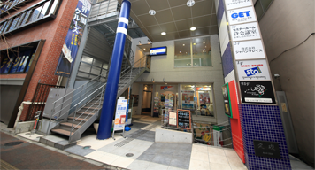 2000年4月に高田馬場営業所と本社を統合する 東京都新宿区高田馬場3-13-1